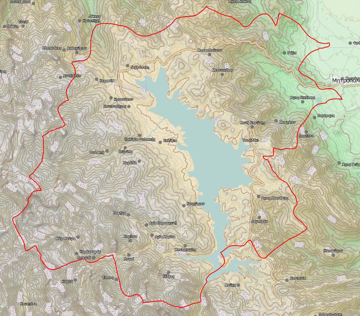 Τοπογραφικός χάρτης του Δήμου Λίμνης Πλαστήρα